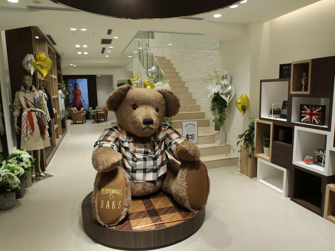 東京都中央区銀座4-3-13 DAKS銀座店